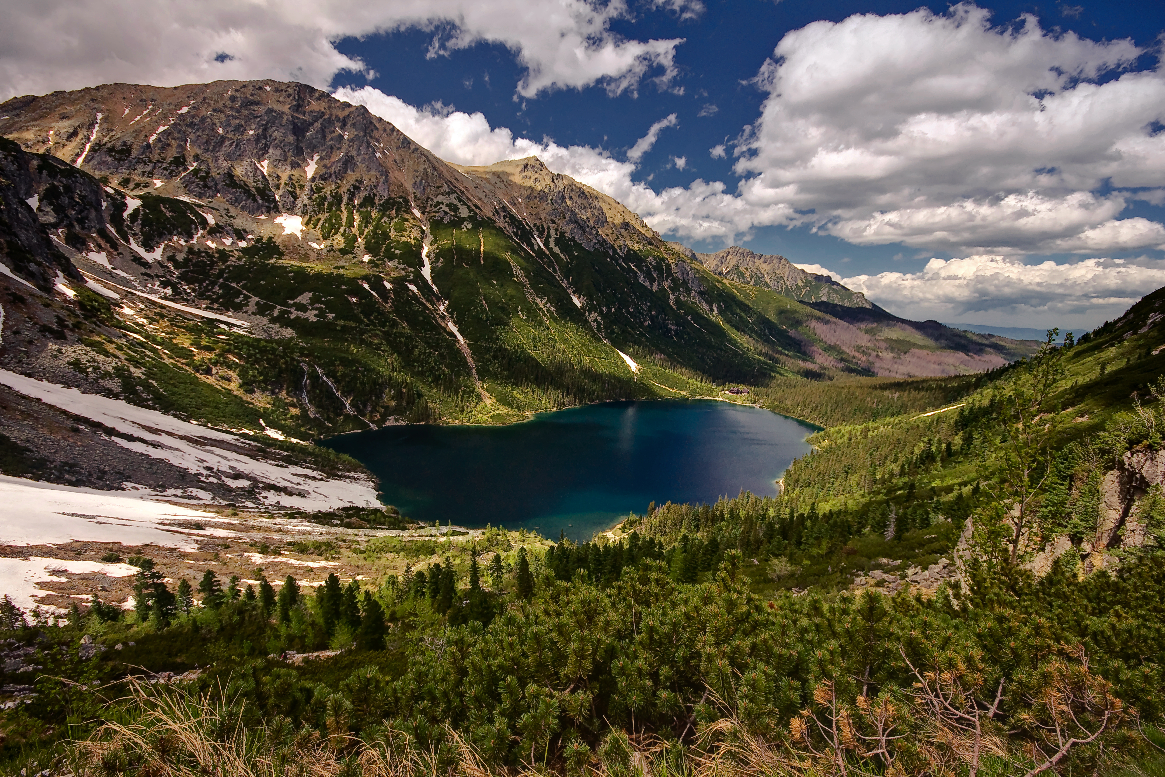 Specjalny obszar ochrony siedlisk Tatry. This is a photography of Natura 2000 protected area with ID PLC120001